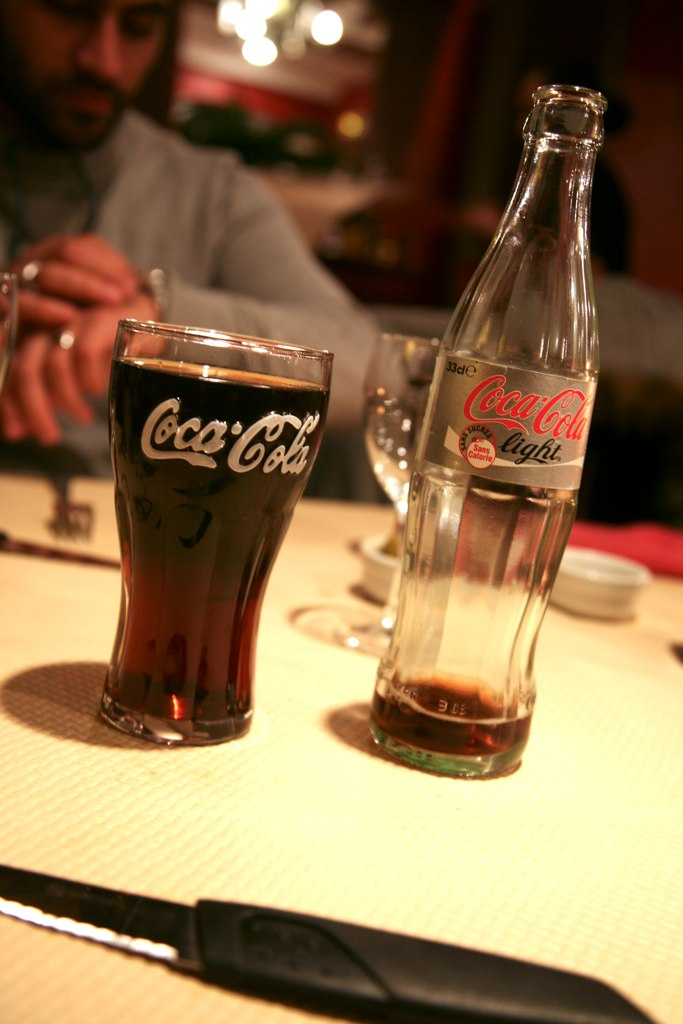 France, Auvergne, Moulins (03), Pizzeria Don Camillo Coca Cola light Diet Coke (pour toutes nos soifs)